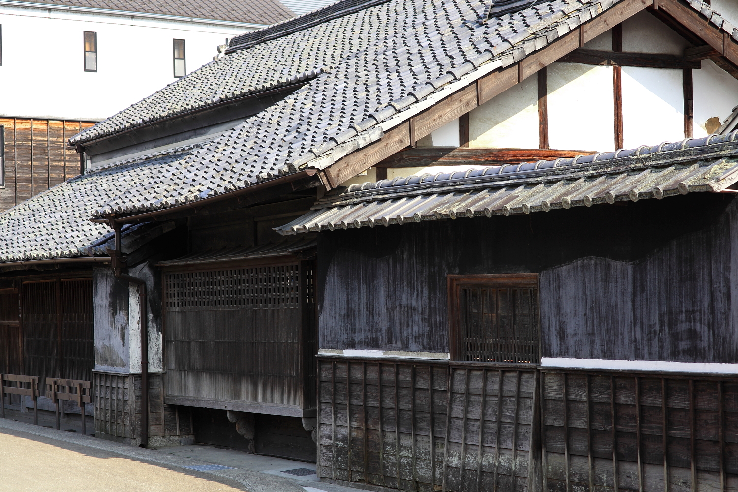 旧鈴木家住宅主屋外観（豊田市足助町、2014年（平成26年）3月）